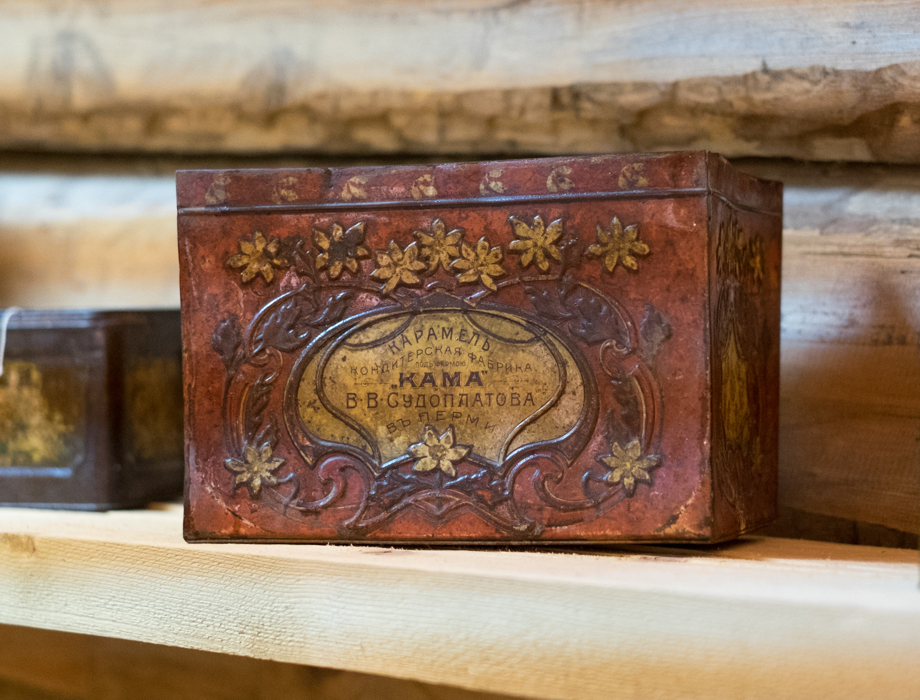 Карамель Кондитерской фабрики под фирмою Кама В. В. Судоплатова в Перми